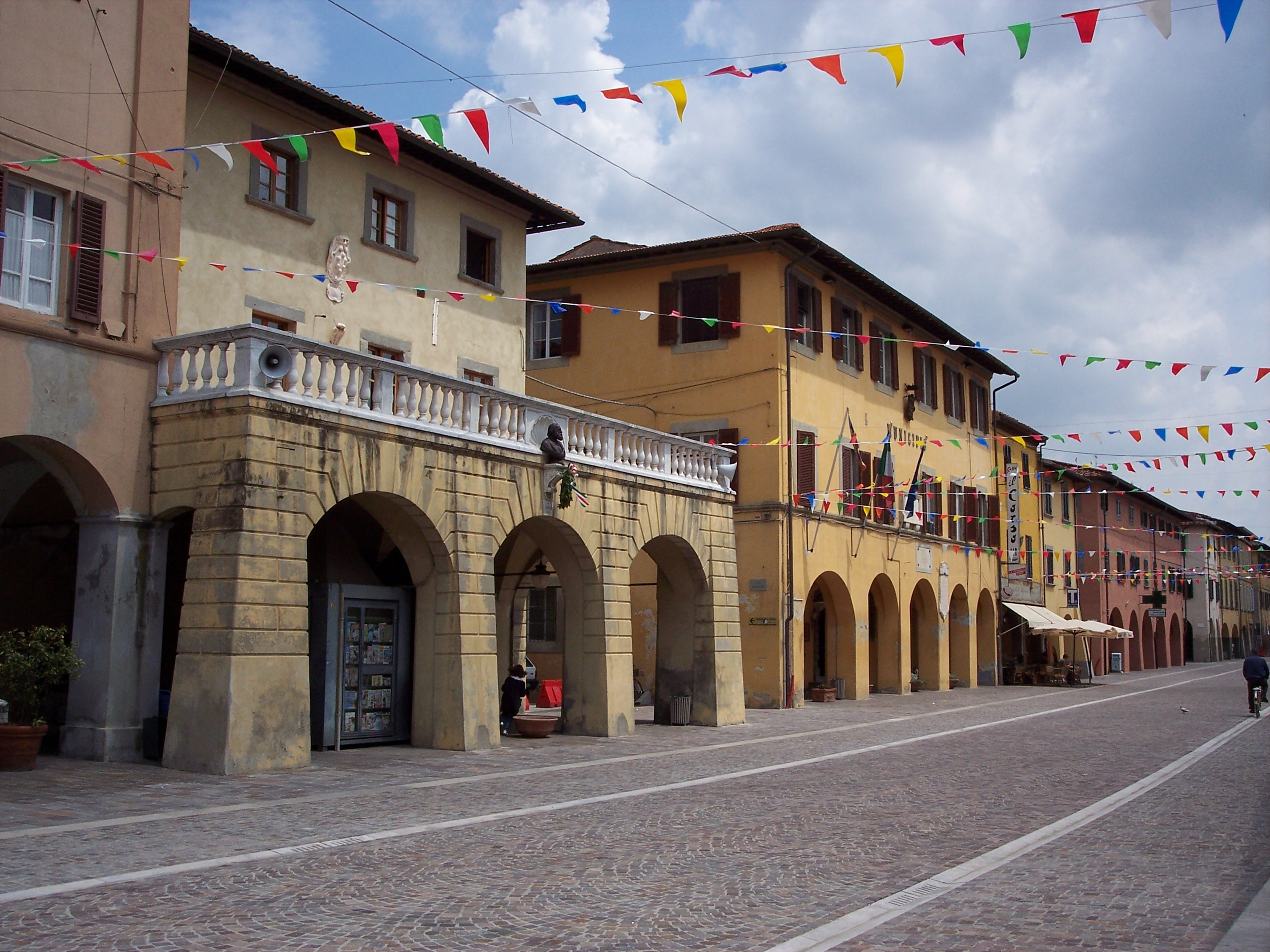 Le ex prigioni con la terrazza e il municipio di Cascina (Pi) che si affacciano sul corso Matteotti